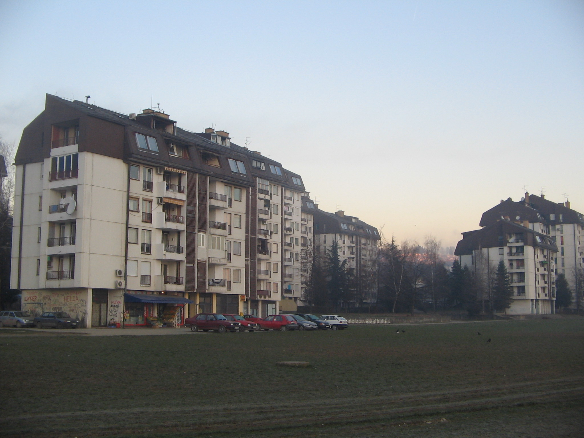 Zgrade nedaleko od BSK-ovog stadiona u banjalučkom naselju Kočićev vijenac.